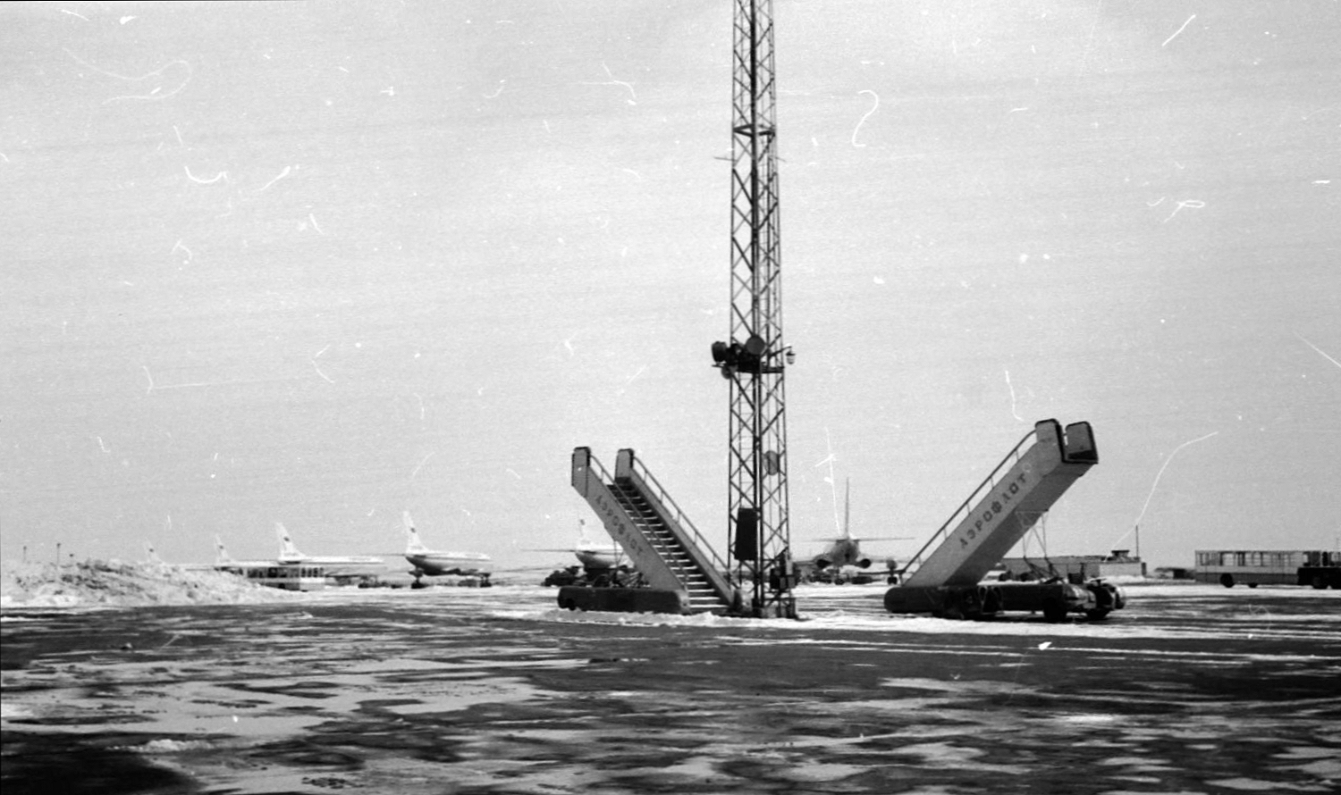 Хабаровский аэропорт весной 1978.